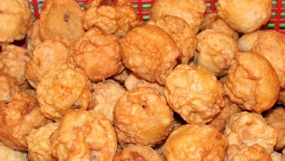 桂阳油炸丸子